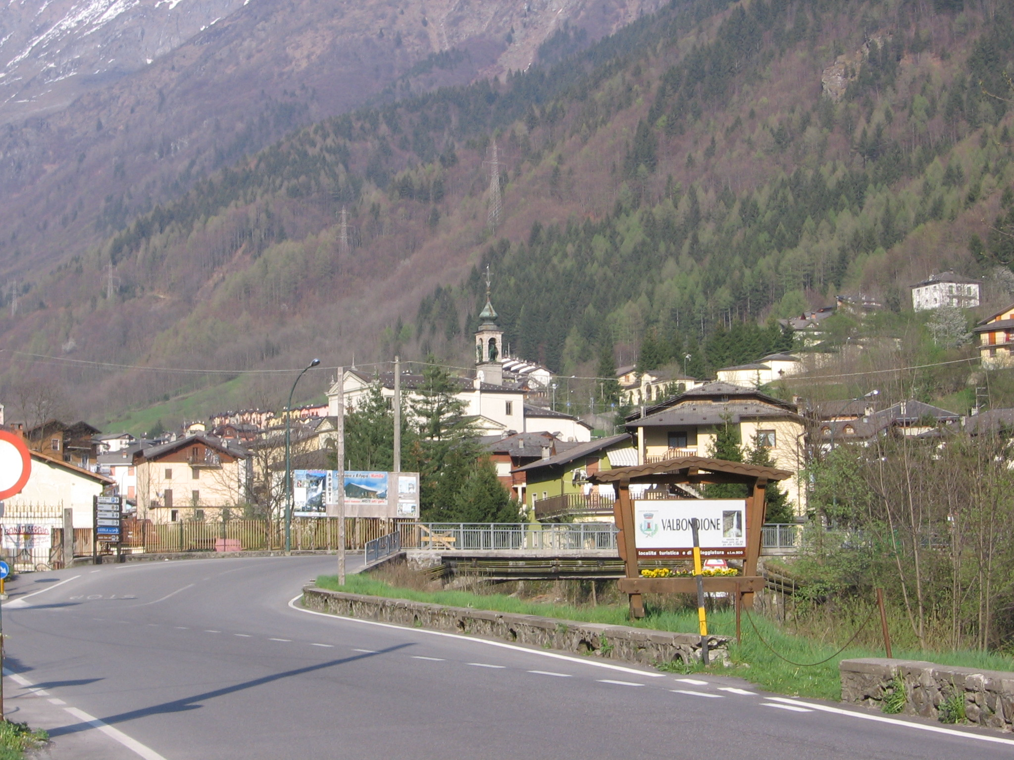 Valbondione, Bergamo, Italia